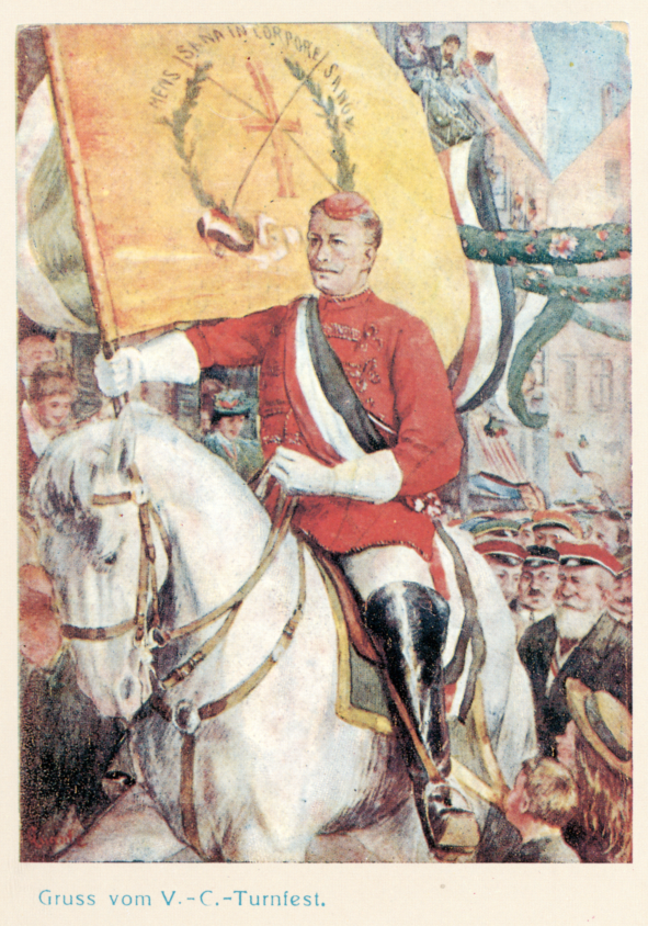 Vertreter Convent Turnfest